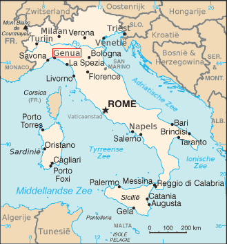 Oorspronkelijk uit CIA Factbook; vertaald in Nederlands door Danielm; omgezet in PNG door BenTels, enkel plaatsnaam met rood gemarkeerd door mij